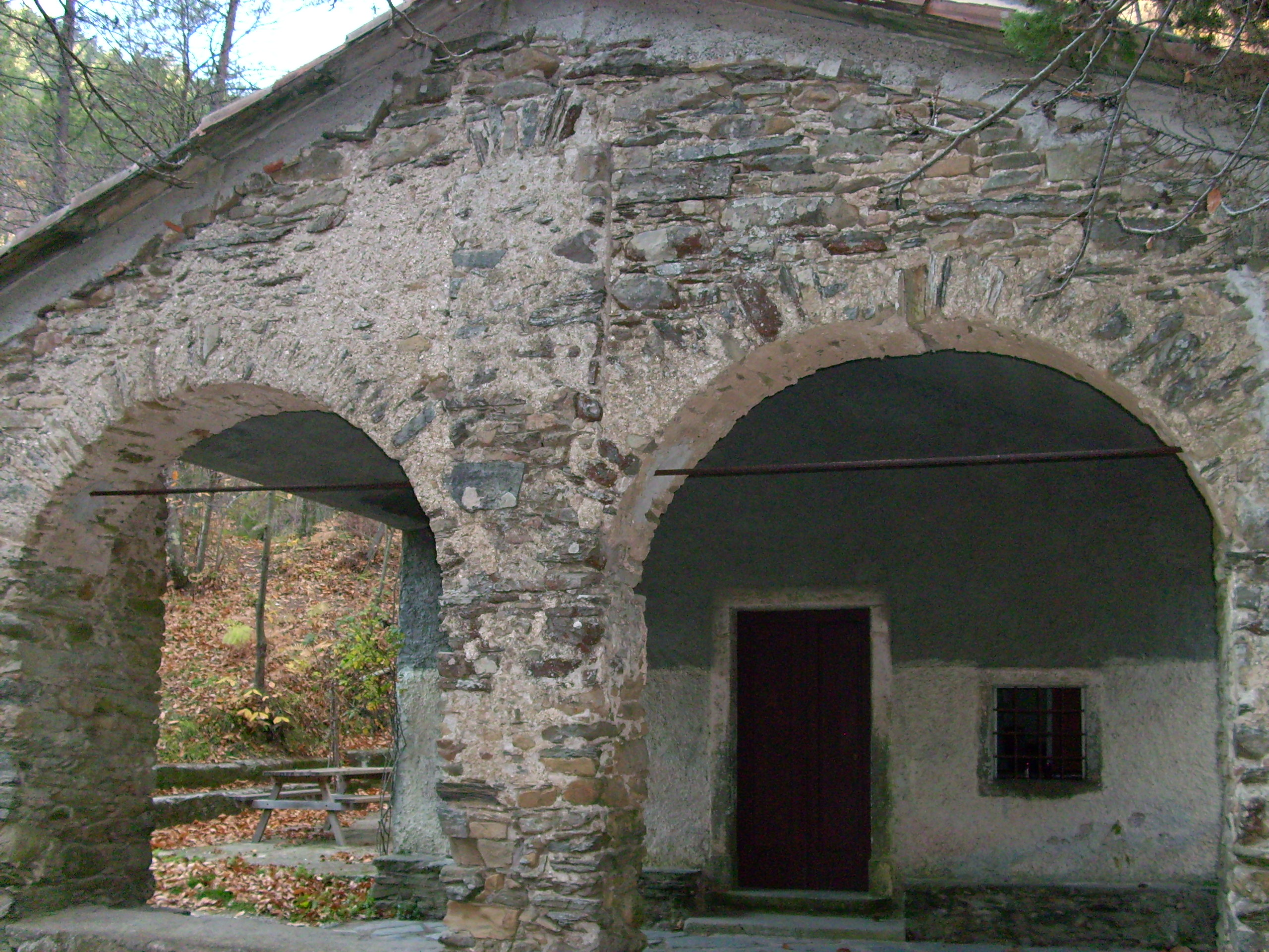 Santuario della Madonna del Buon Consiglio, Pignone, Liguria, Italia